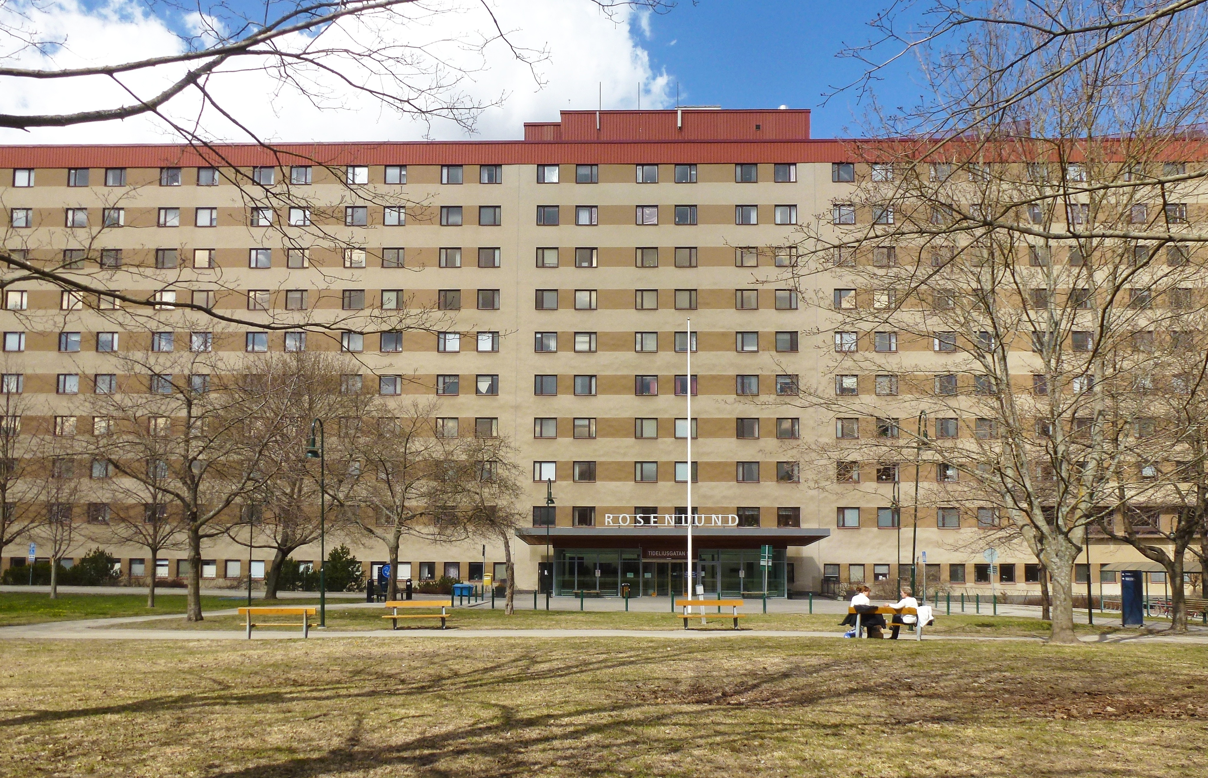 Rosenlunds sjukhus, arkitekt Ervin Pütseps Arkitektkontor